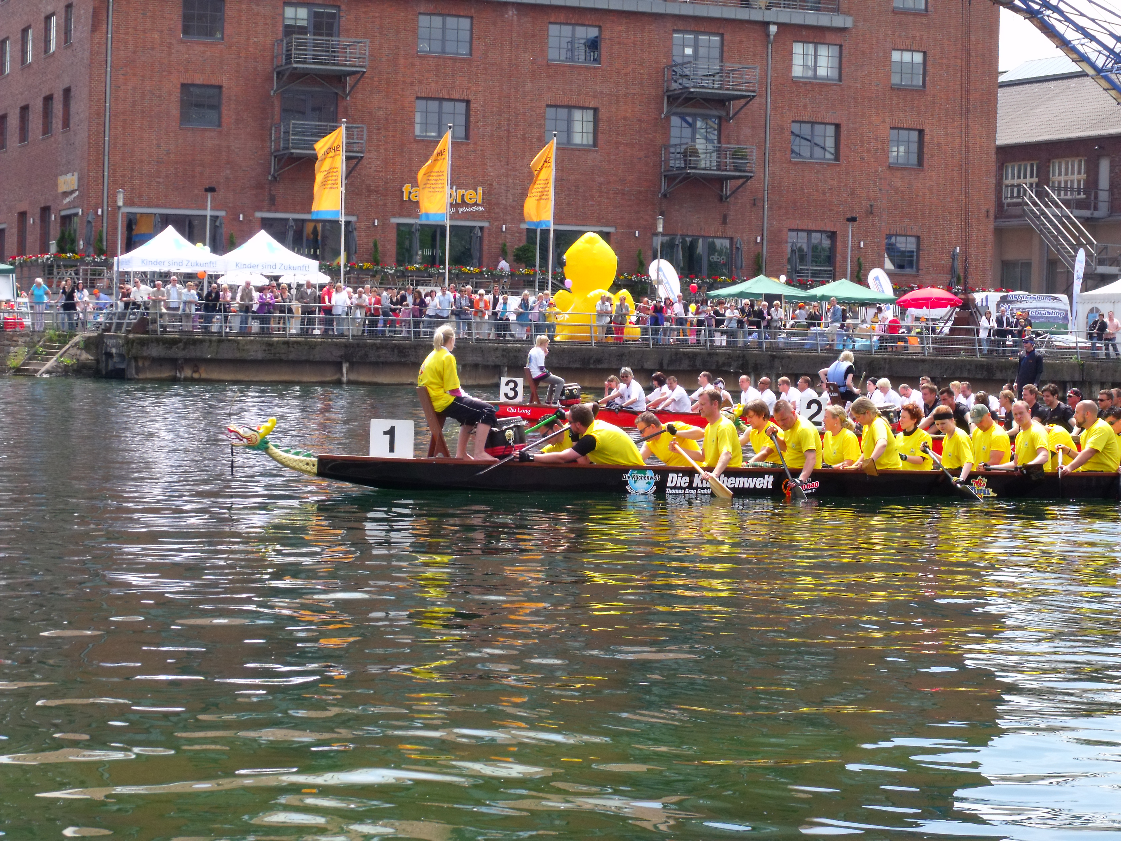 11. Drachenboot-Fun-Regatta im Duisburger Innenhafen